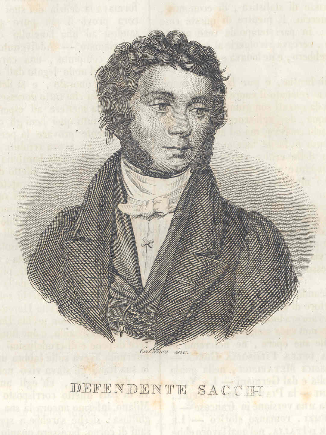 Ritratto di Defendente Sacchi - incisione da disegno, opera il cui autore è morto da più di 70 anni.